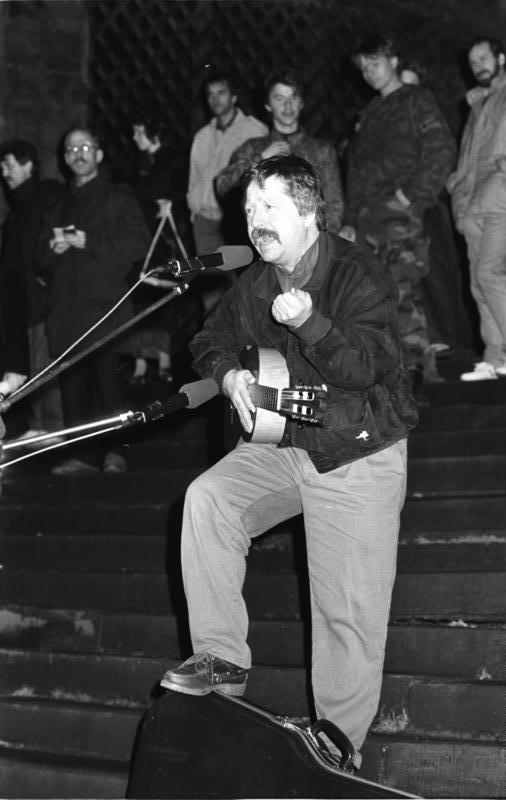 ADN-ZB/Hirndorf/ Erfurt: Vor mehr als 30 000 Demonstranten, die sich auf dem Domplatz versammelt hatten, sang und sprach der Liedermacher Wolf Biermann. Plakate "für unser freies Thüringen" und "Deutschland einig Vaterland - das Volk soll entscheiden" sowie "Nazis raus" bestimmten das Bild der Donnerstagsdemonstration.